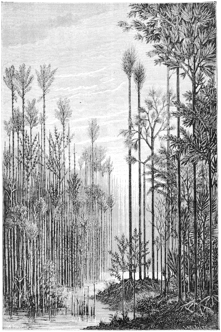 Reconstruction de la flore houillère du bassin de Saint-Étienne (d’après les découvertes de M. Grand’Eury).